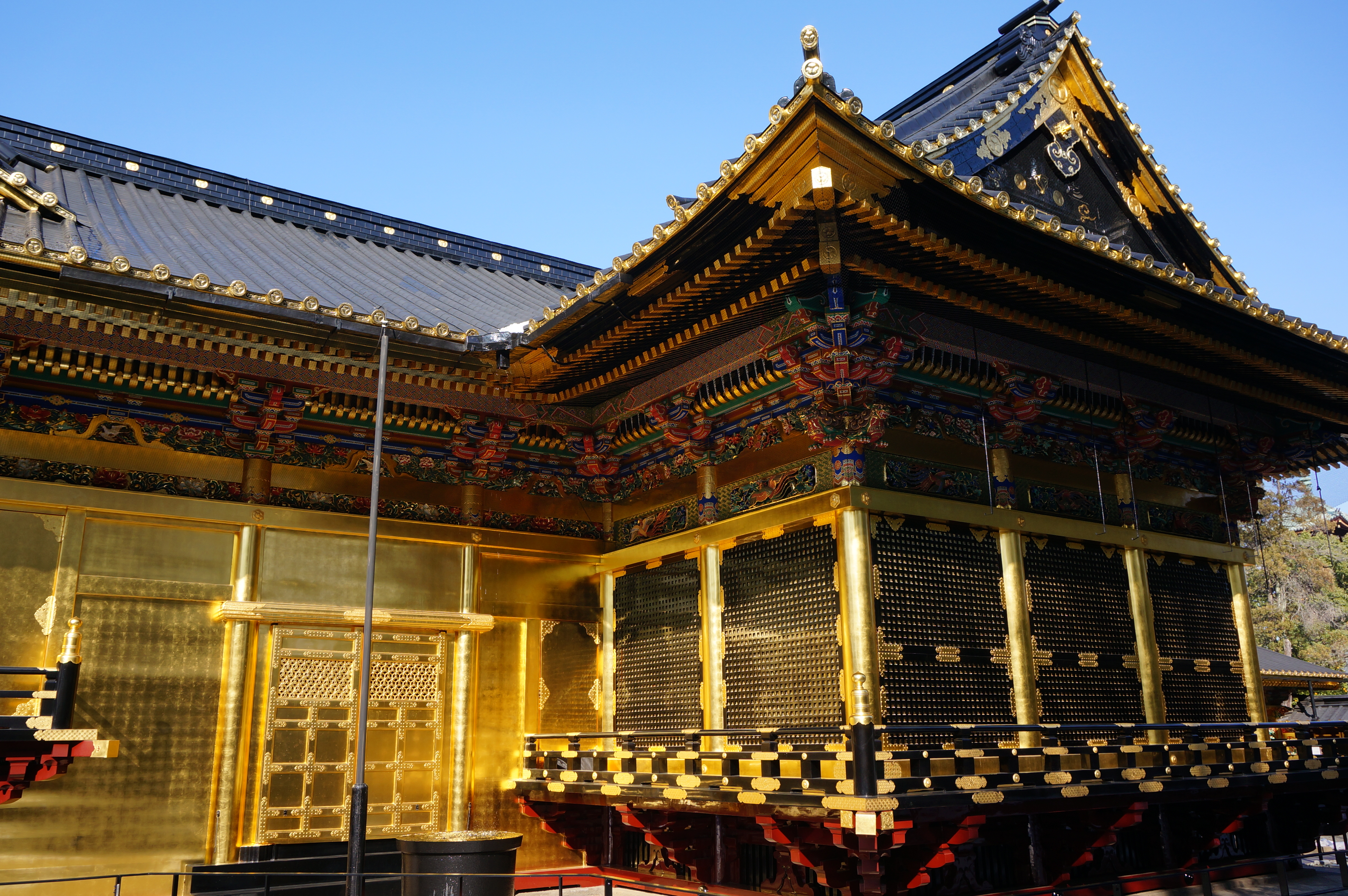 横から見た上野東照宮本殿。